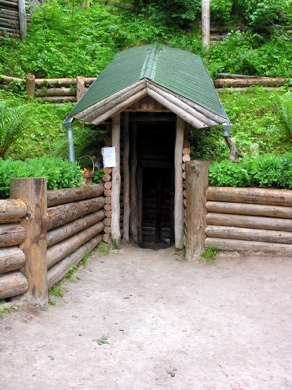 Riežupės ola, įėjimas į olą